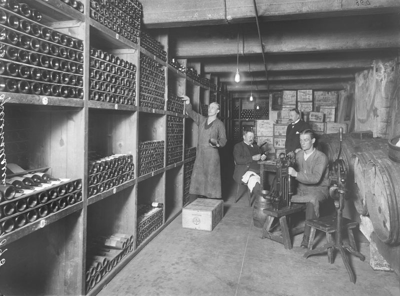 Operakällarens vinkällare, Stockholm